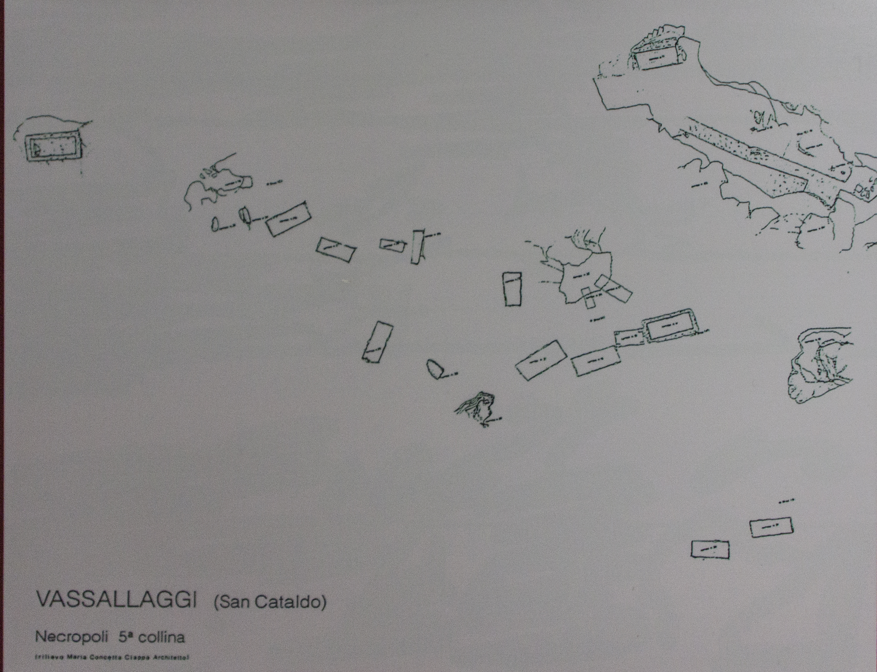 pannello del museo di Caltanissetta